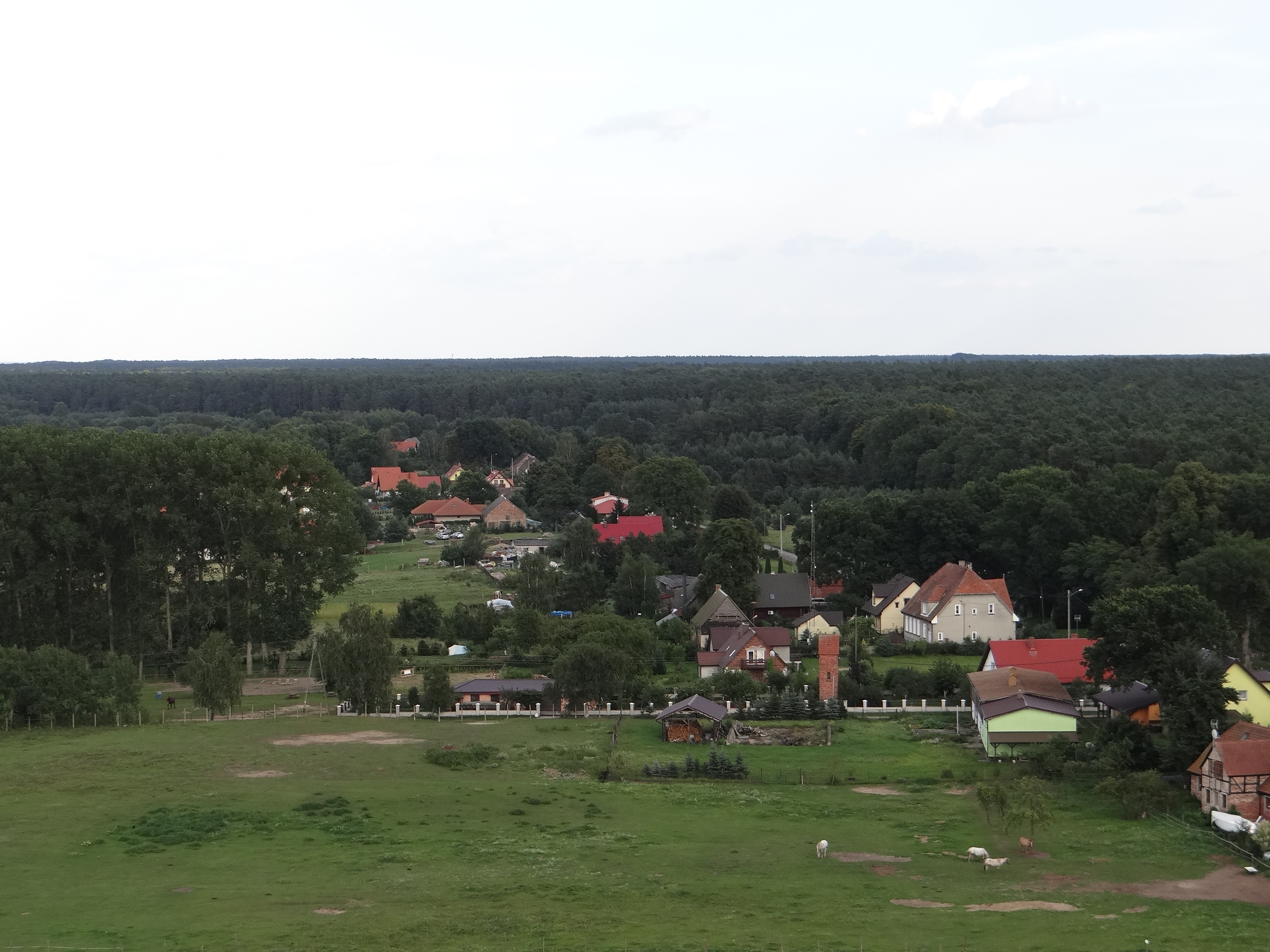 Widok na Brzózki